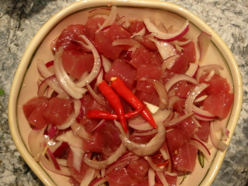 Ahi poke (raw fish salad)